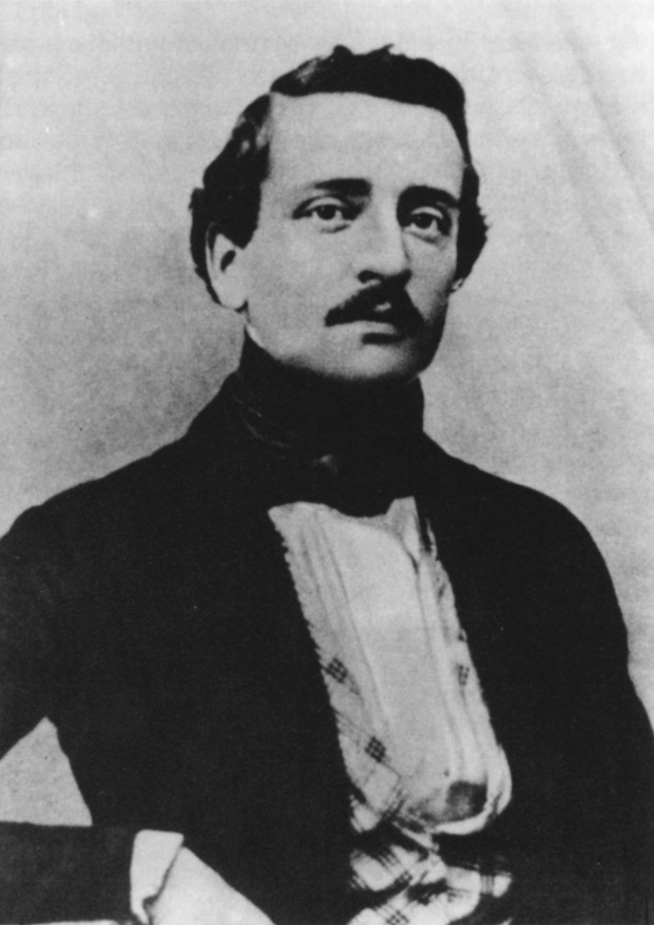 Ferdinand Otto Freiherr von Nordenflycht (10.12.1816-24.5.1901).